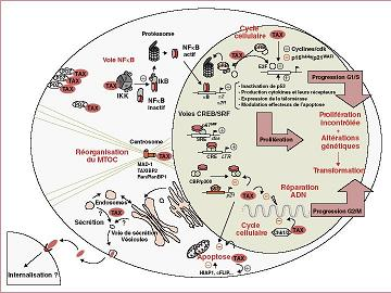 Localisation et Fonction